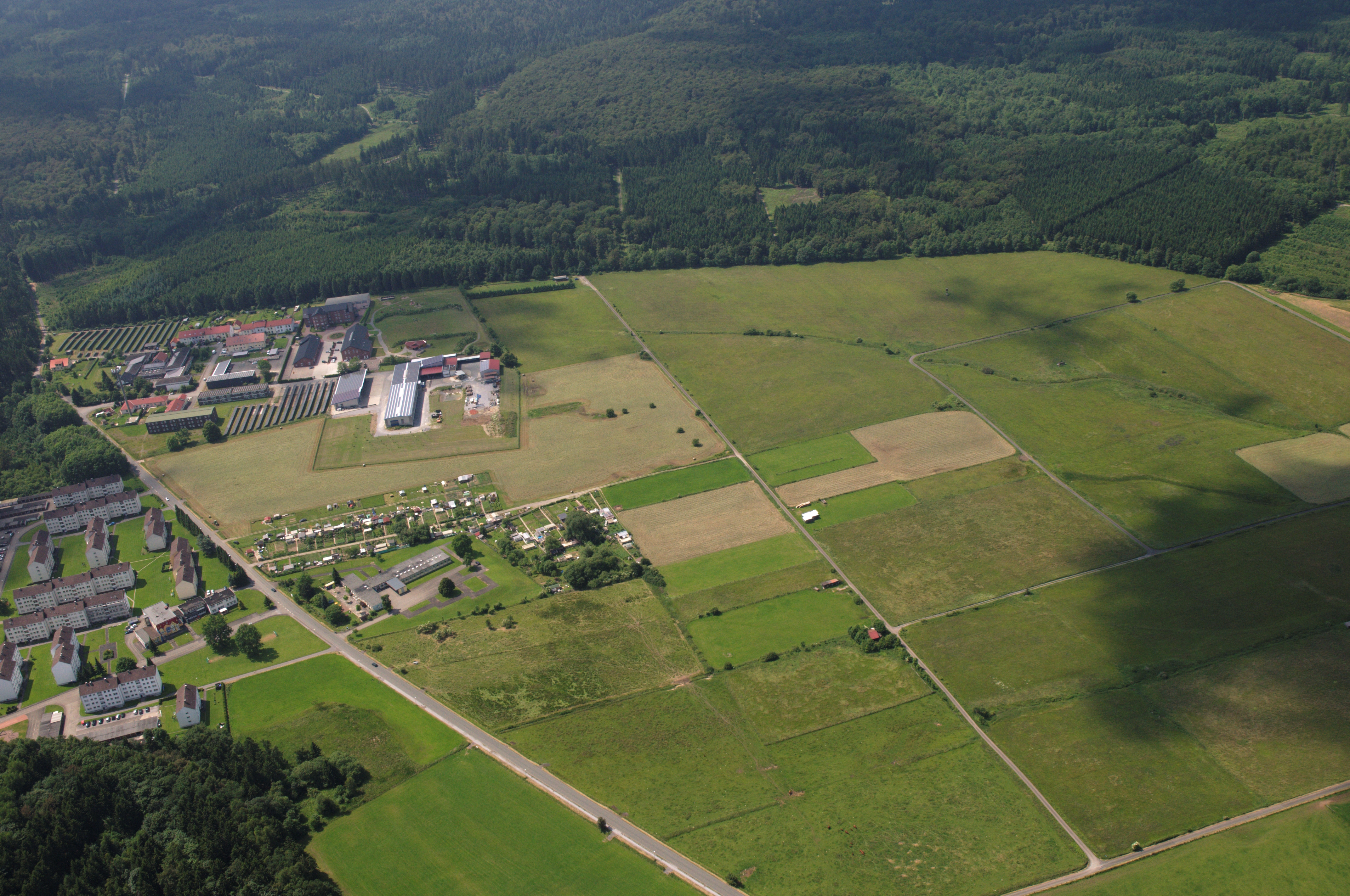 Fotoflug Sauerland-Ost, rechts Naturschutzgebiet Auf dem Bruch und links ehemalige Wohnsiedlung der belgischen Nato-Streitkräfte bei Essentho, Marsberg The making of this document was supported by the Community-Budget of Wikimedia Germany.